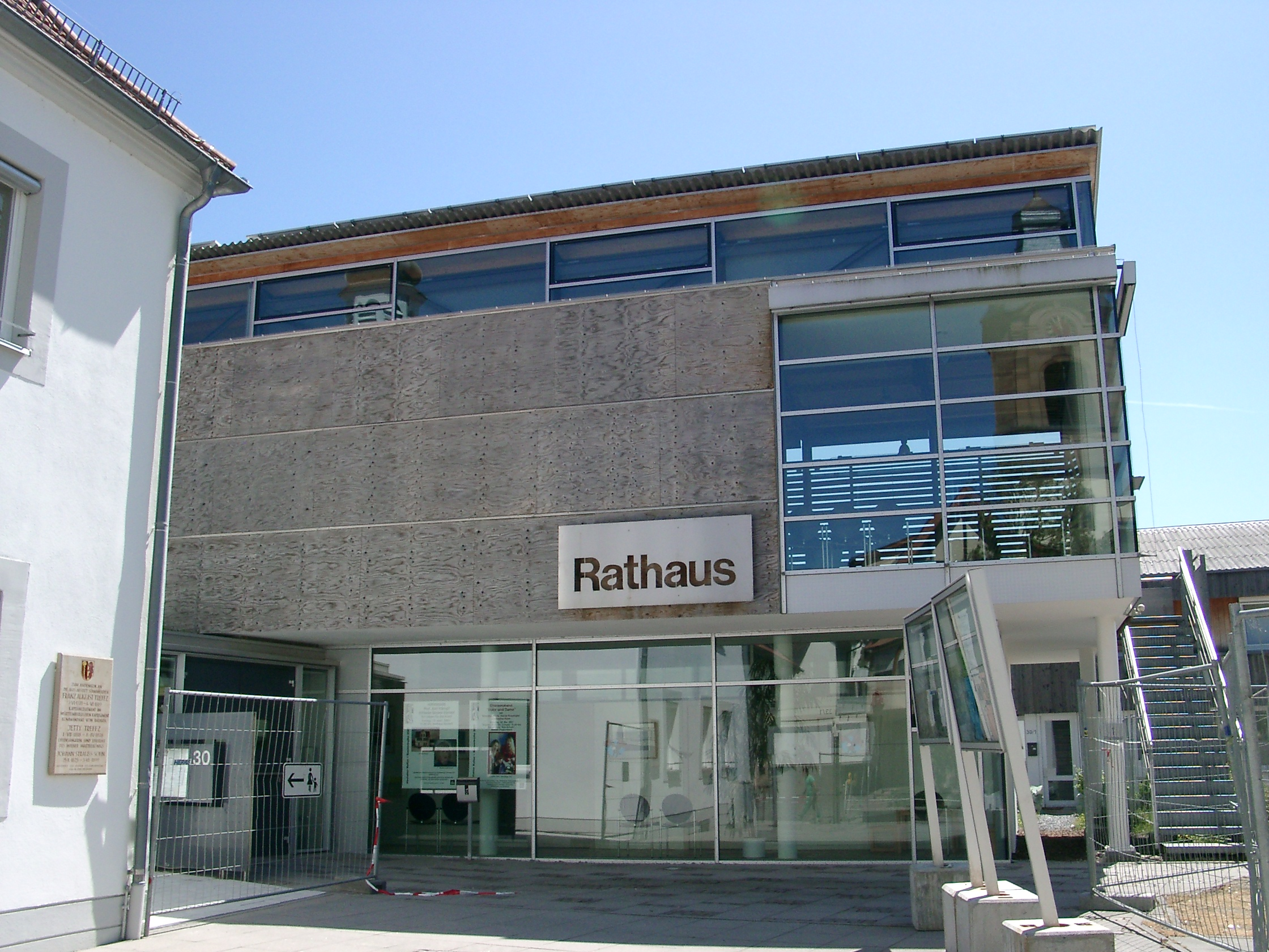 Abstatt, Rathaus